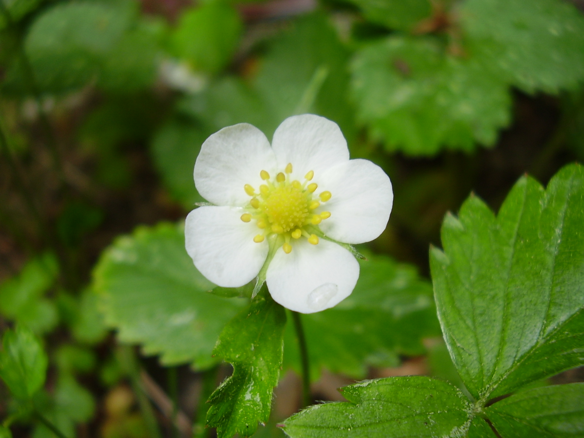 Fragaria vesca Photo taken by Käyttäjä:kompak (23rd of June 2005)